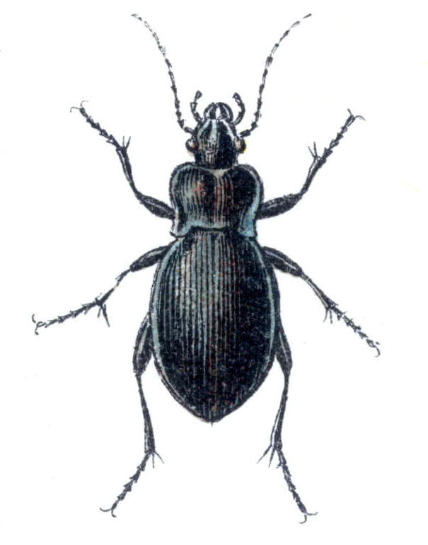 Carabus convexus